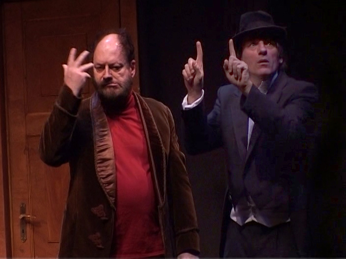 Edmund Gleede, Cechov - Der Heiratsantrag mit Thomas Haydn